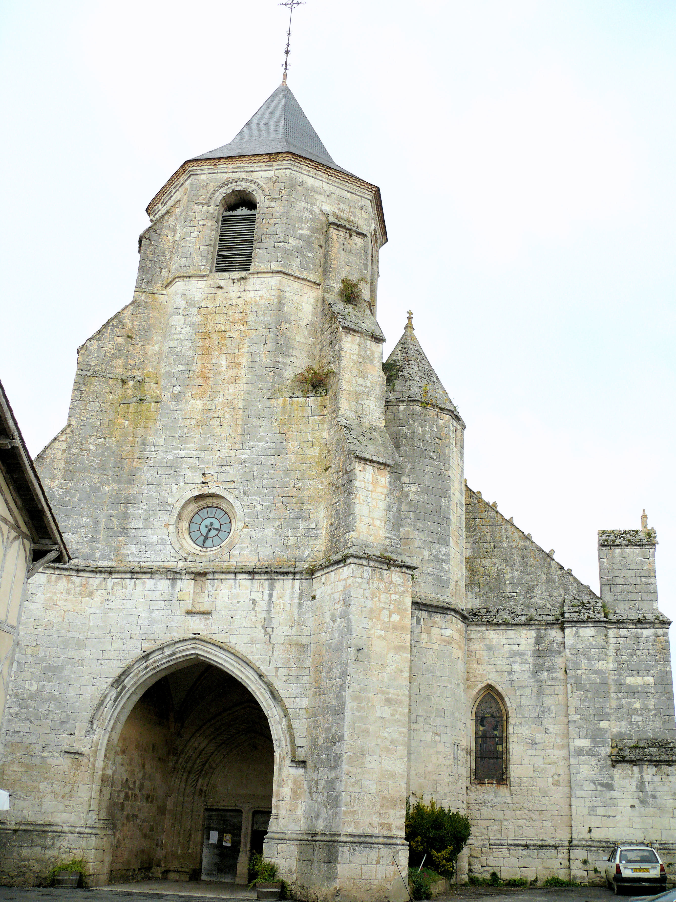 Issigeac - Eglise Saint-Félicien - Façade occidentale : porche et clocher